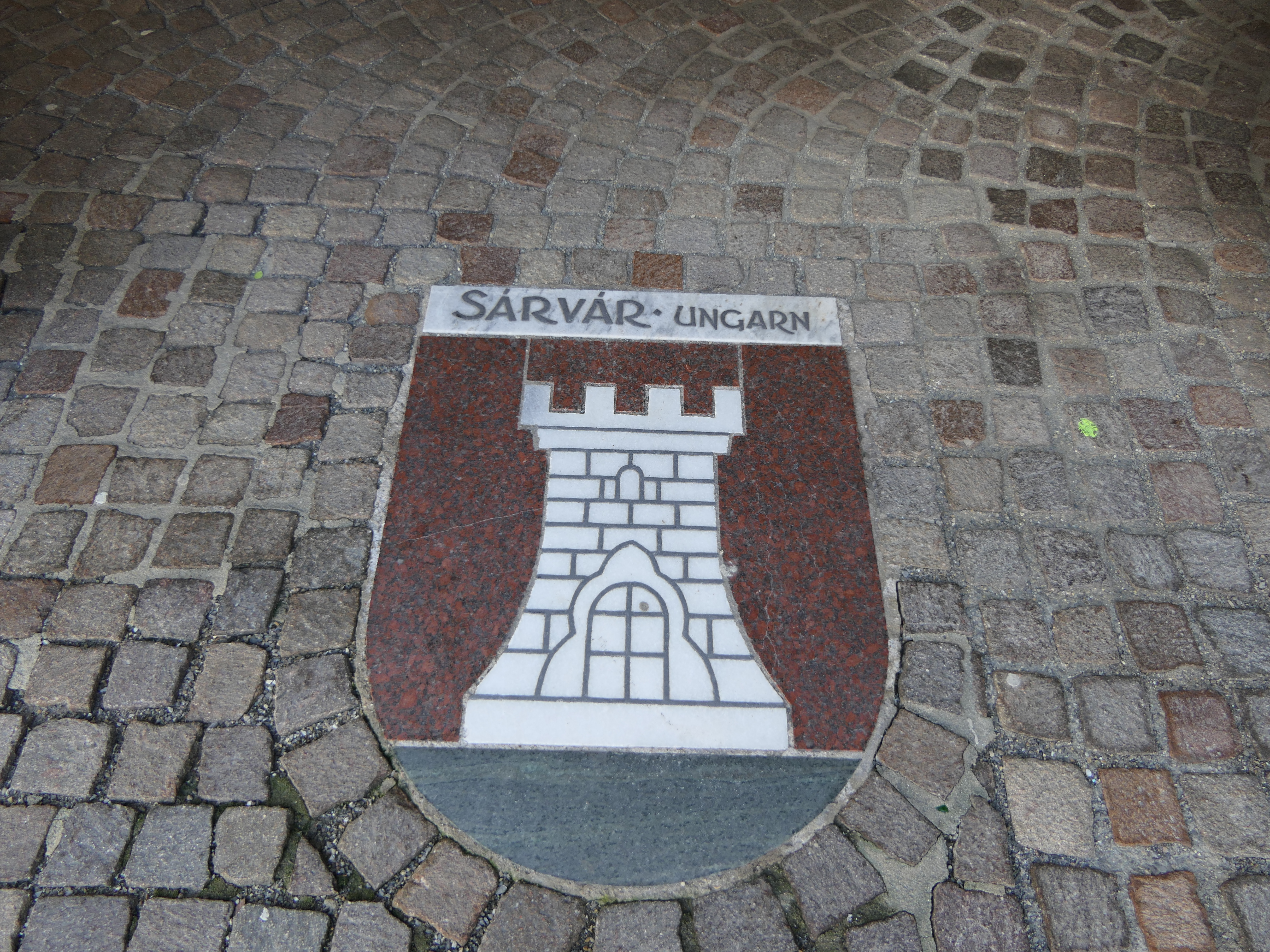 Bodentafel zu Ehren der Partnerstadt Sarvar (Ungarn) am Rathaus in Steinheim an der Murr.